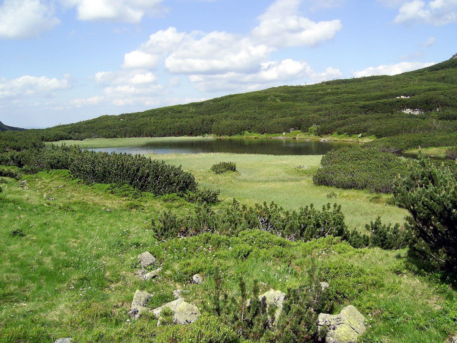 Litworowy Staw Gąsienicowy ze szlaku na Świnicką Przełęcz